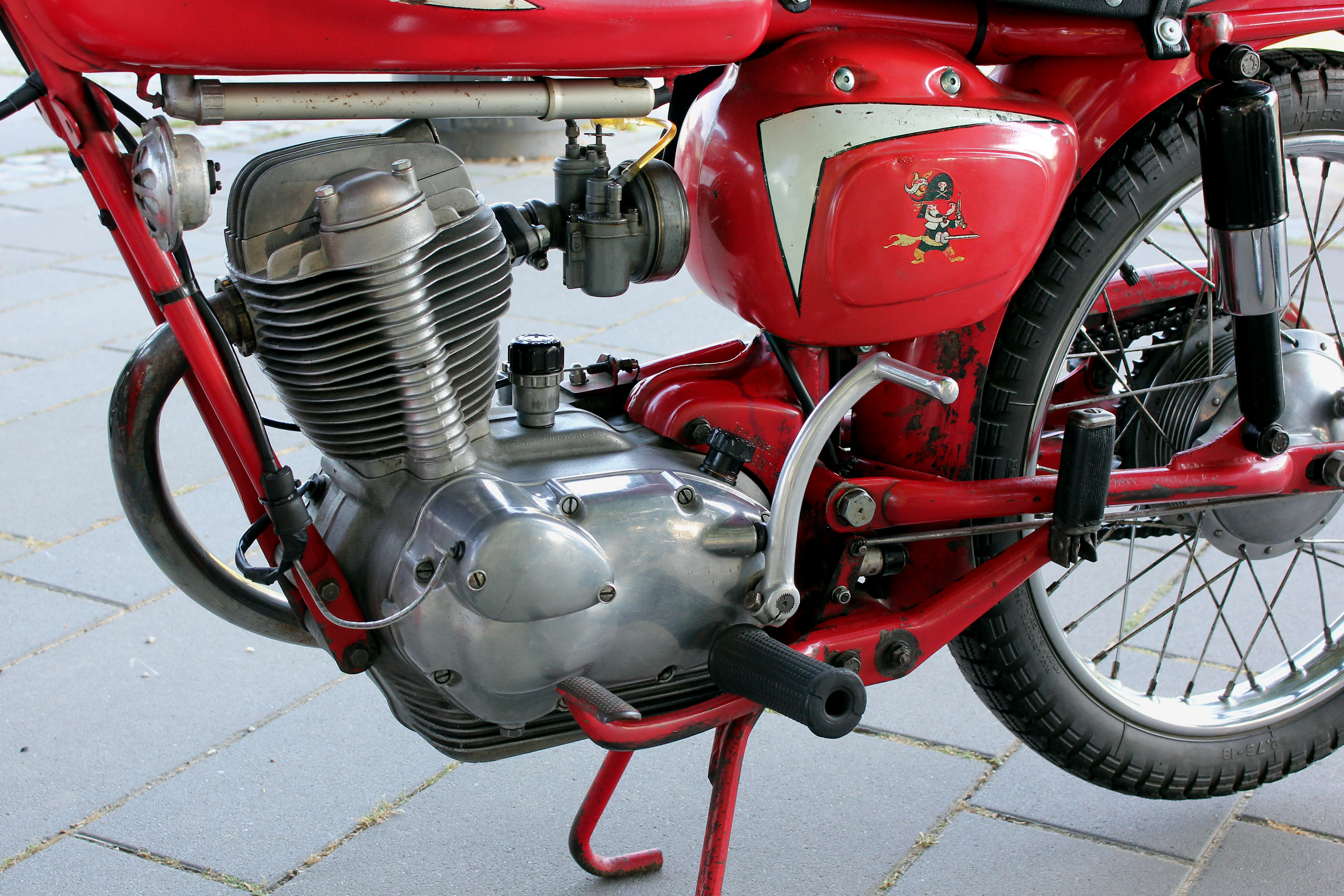 Moto Morini Corsaro, OHV-Motor, 125 cm³, 7 PS; Baujahr 1961 (In dem Rohr am Zylinder laufen zwei Stoßstangen, keine Königswelle, wie vermutet werden könnte.